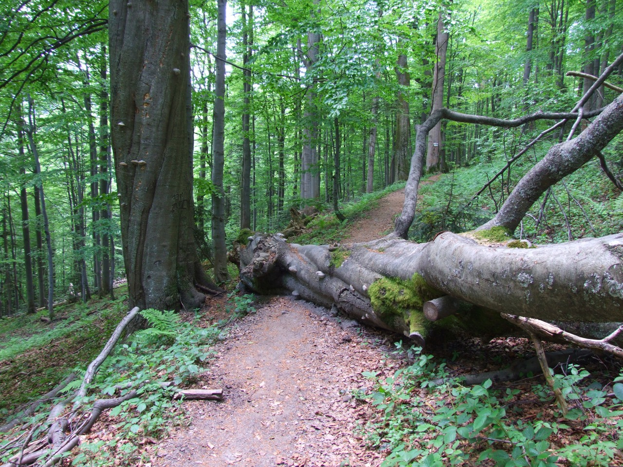 Gorczański Park Narodowy